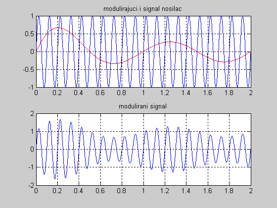 Prikaz AM signala napravljen u MATLabu